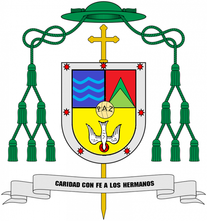 Escudo